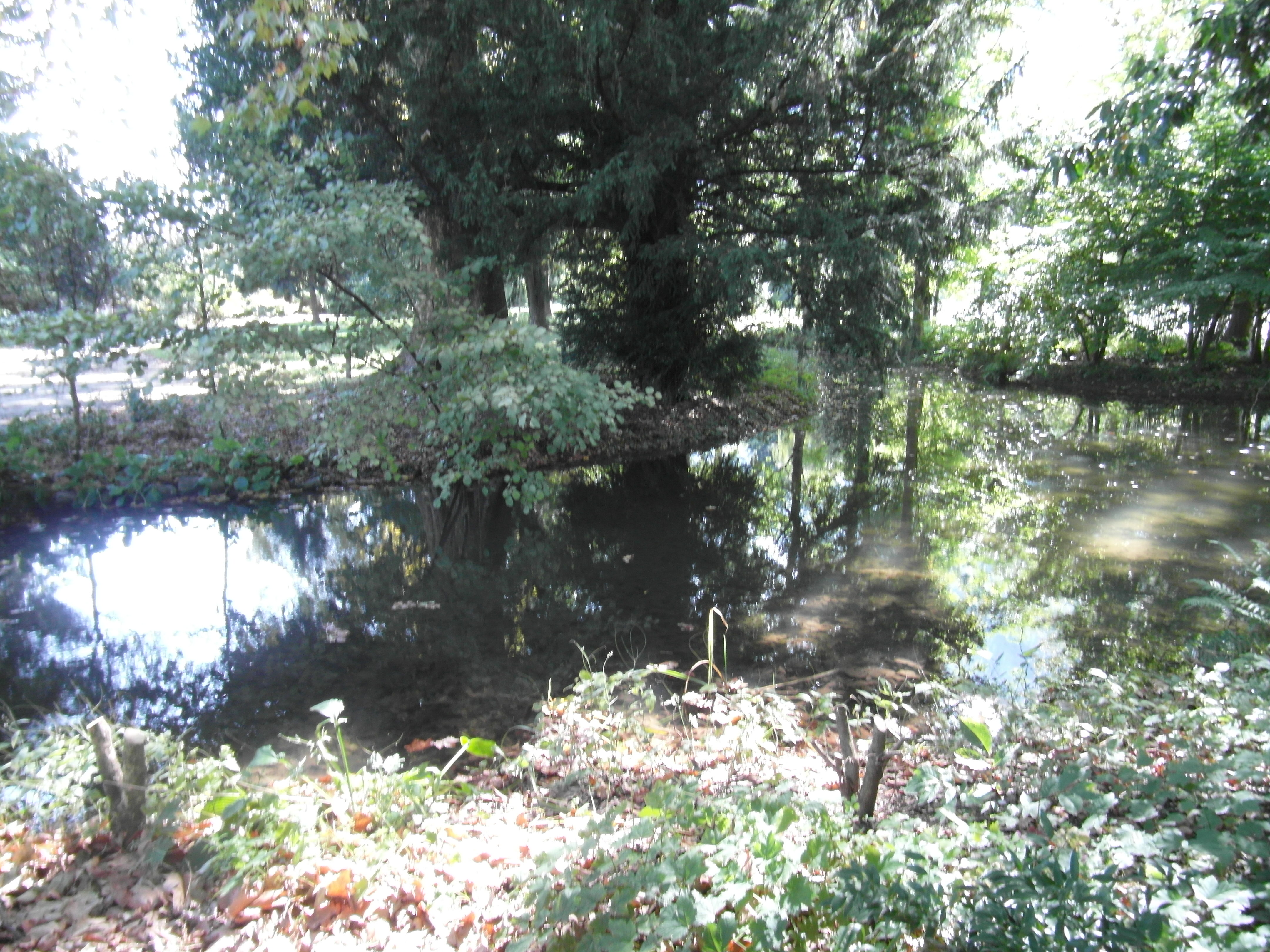 Parc du Château à Sassenage